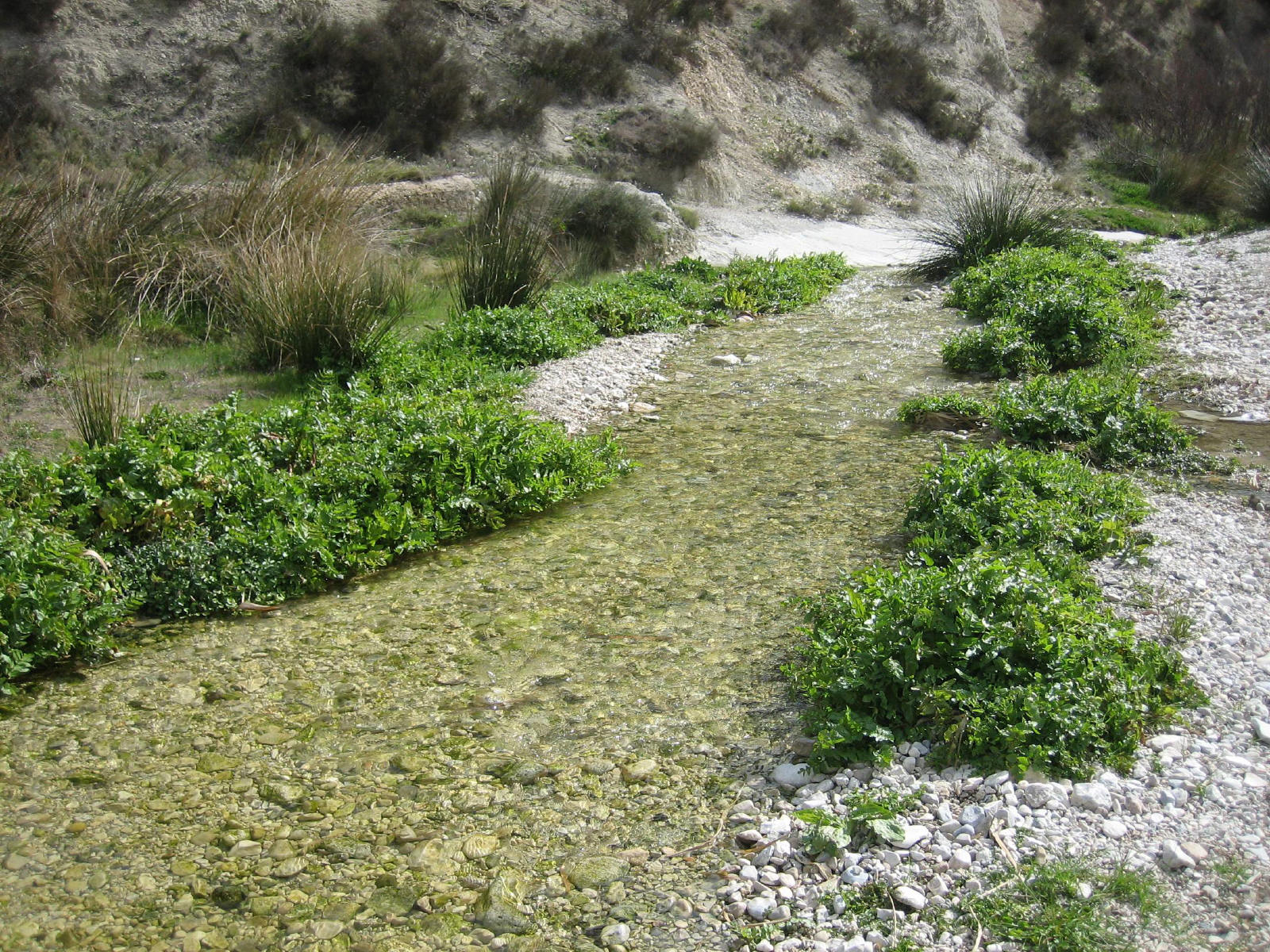 El río Verde o Monnegre a la altura del puente de Tibi (Alicante, España). Foto realizada por Rodriguillo el día 24/02/2005.